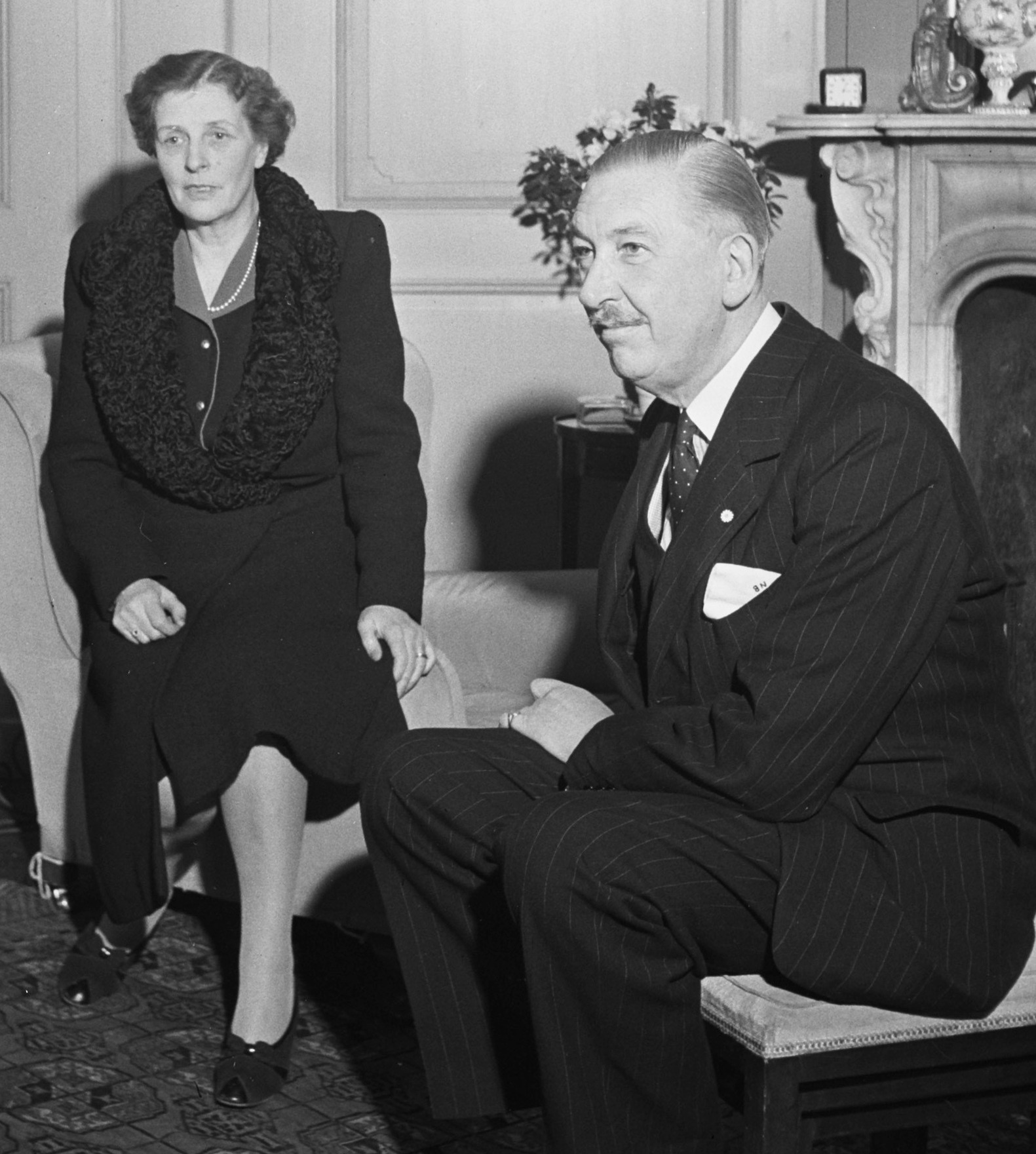 Britse ambassade en ambassadeur Bland